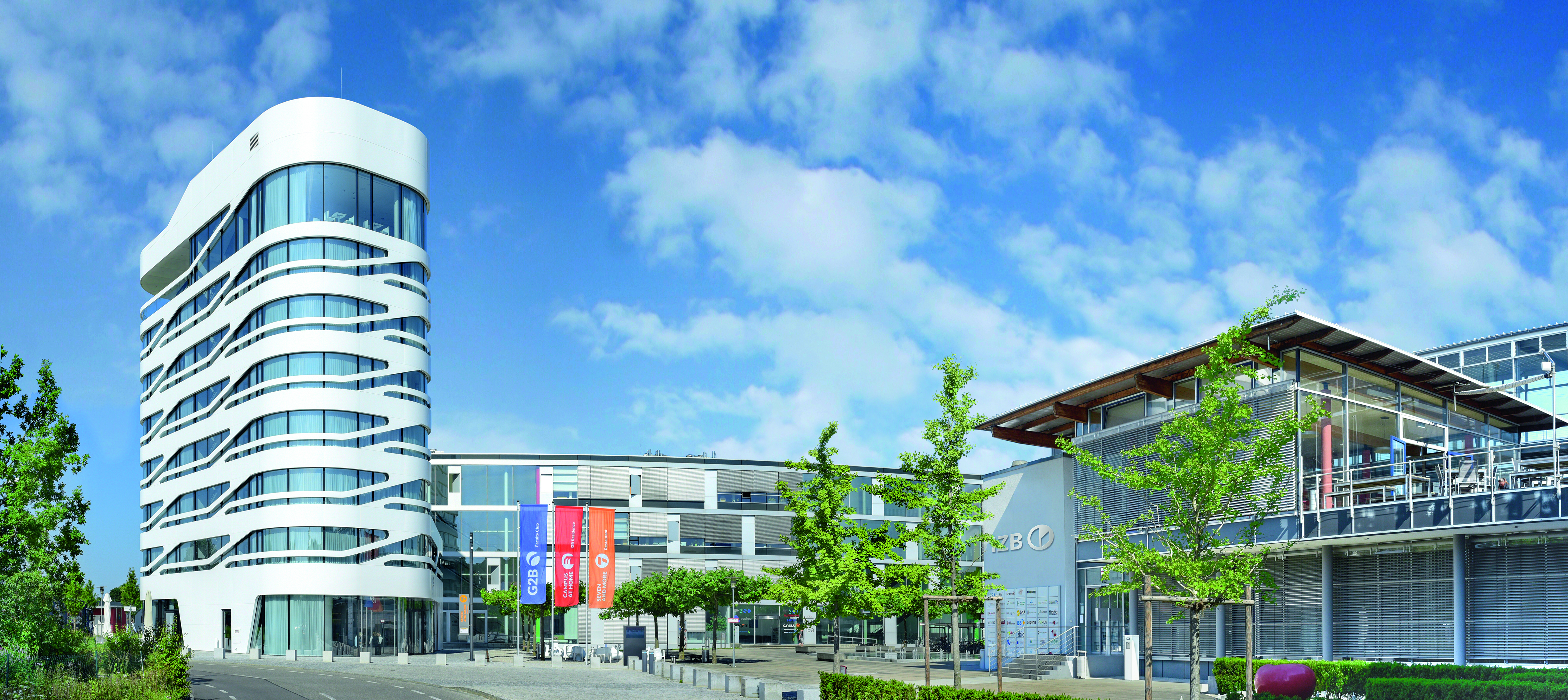 IZB Residence CAMPUS AT HOME links sowie der Haupteingang des IZBs in Martinsried rechts